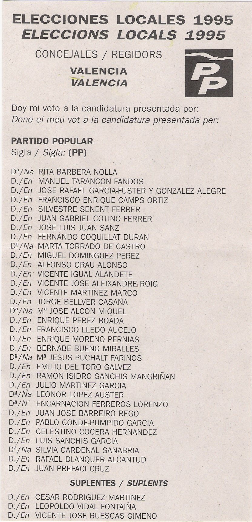 Papeleta electoral del Partido Popular. Elecciones locales de 1995. Municipio de Valencia.